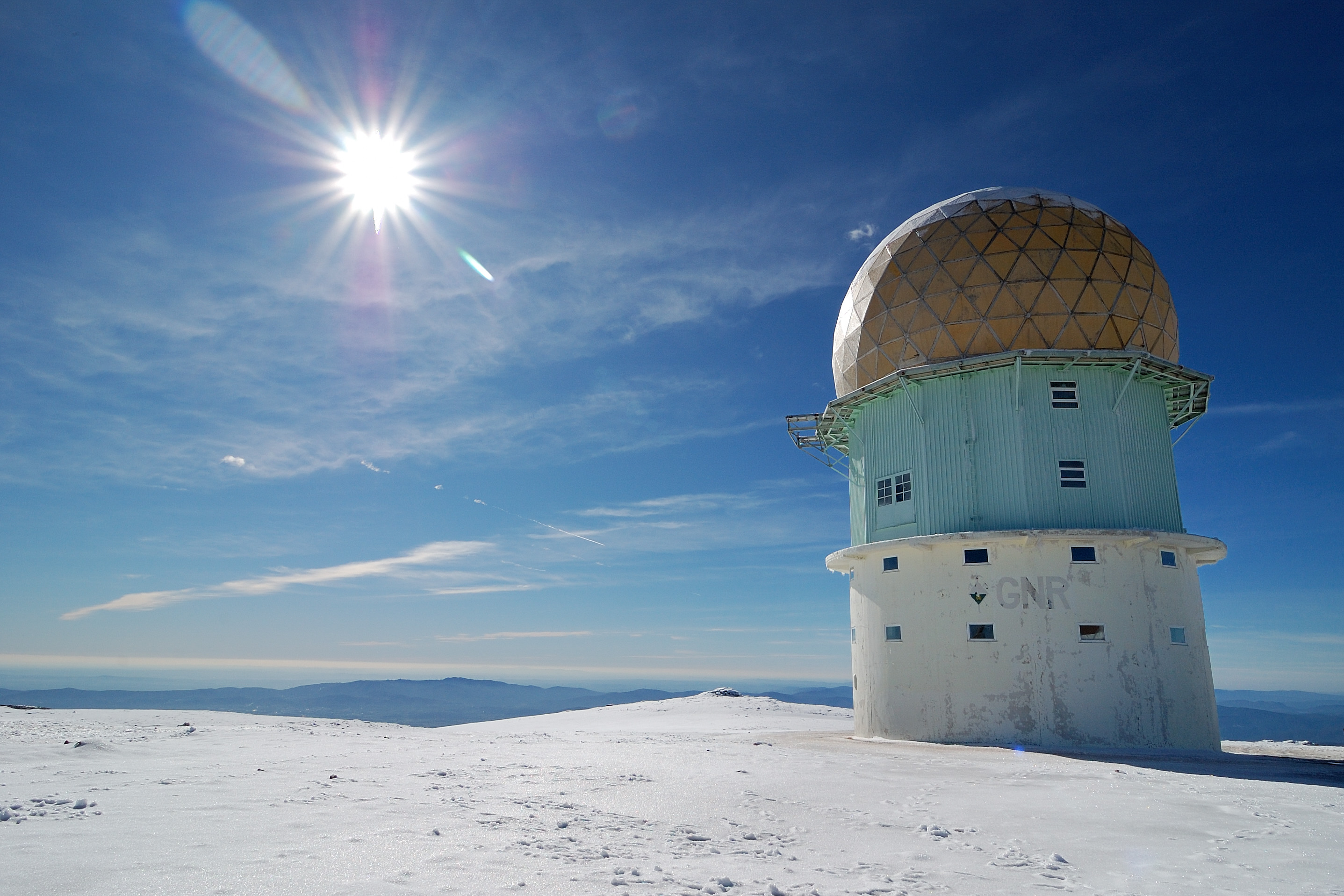 Torre, Serra da Estrela, Portugal [2010]